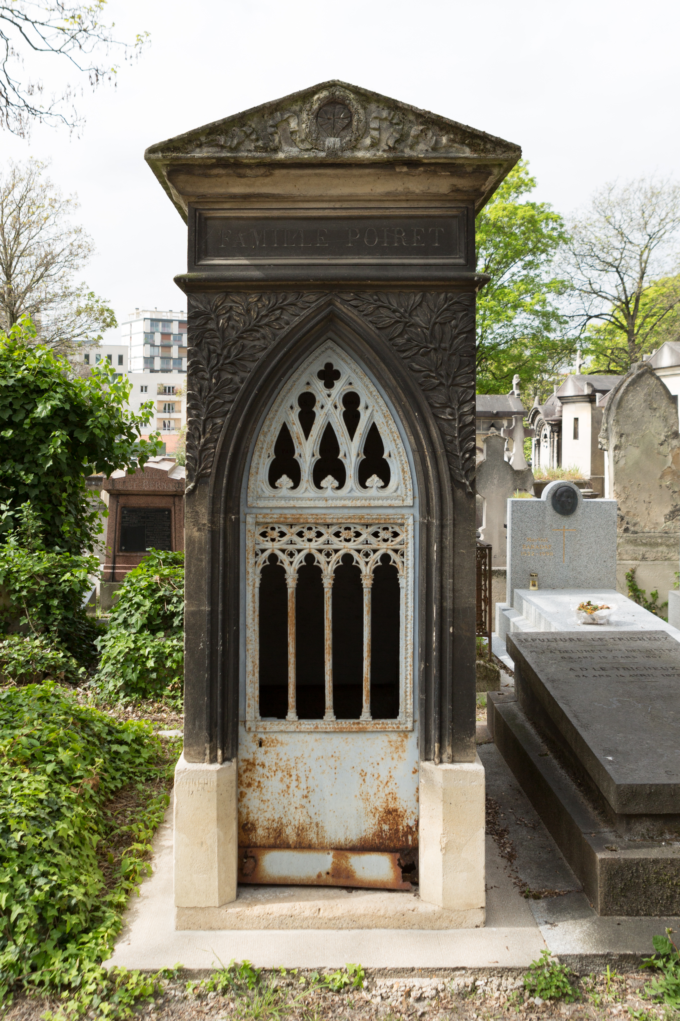 Sépulture de Georges Poiret (1872-1932), gouverneur des colonies.